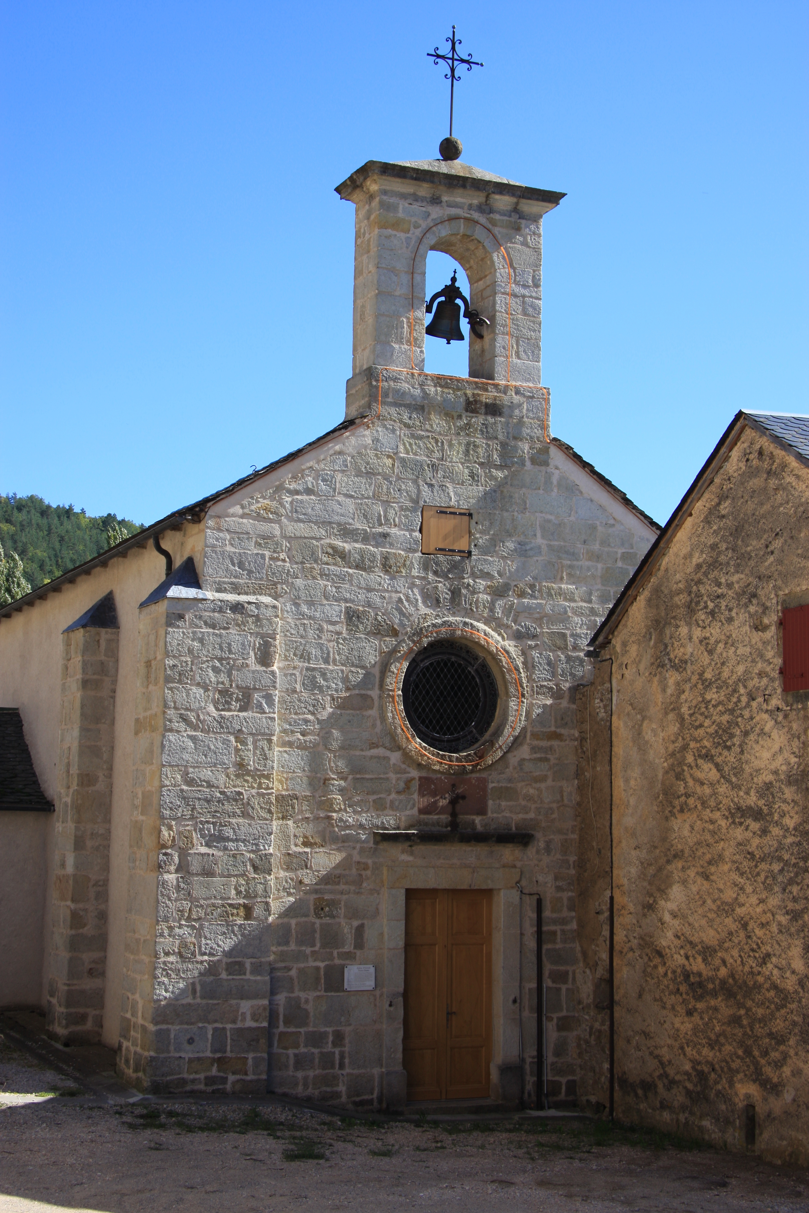 Église priorale Notre-Dame-de-l'Assomption de Gatuzières